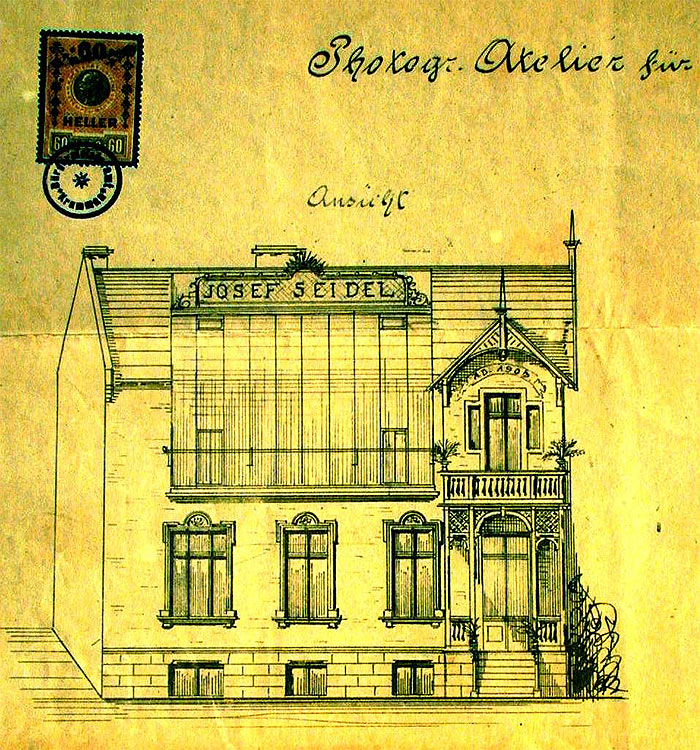 Ateliér Josefa Seidela v českém Krumlově – výřez z původní projektové dokumentace